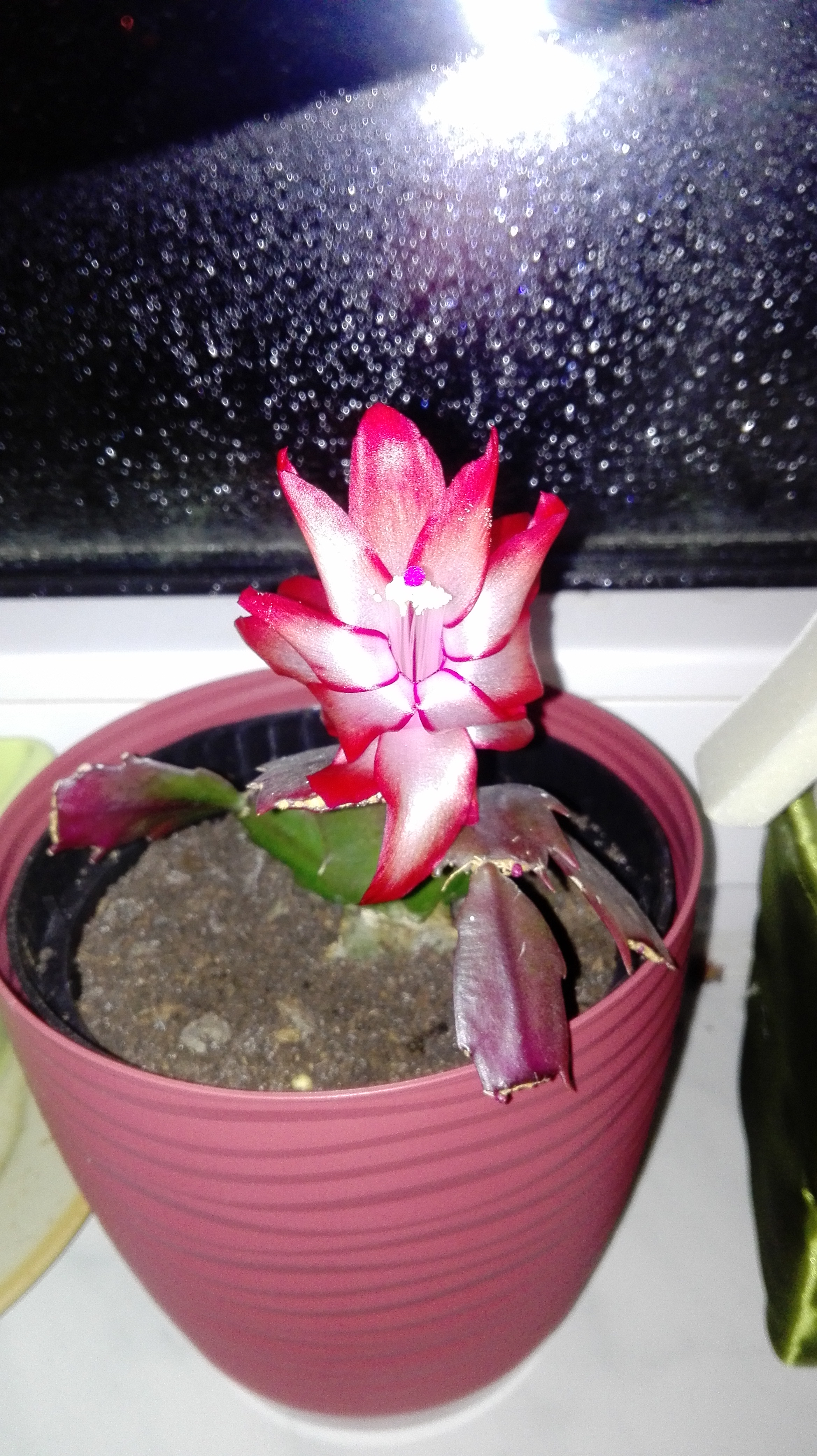 Zakwitnięcie grudnika zimą.